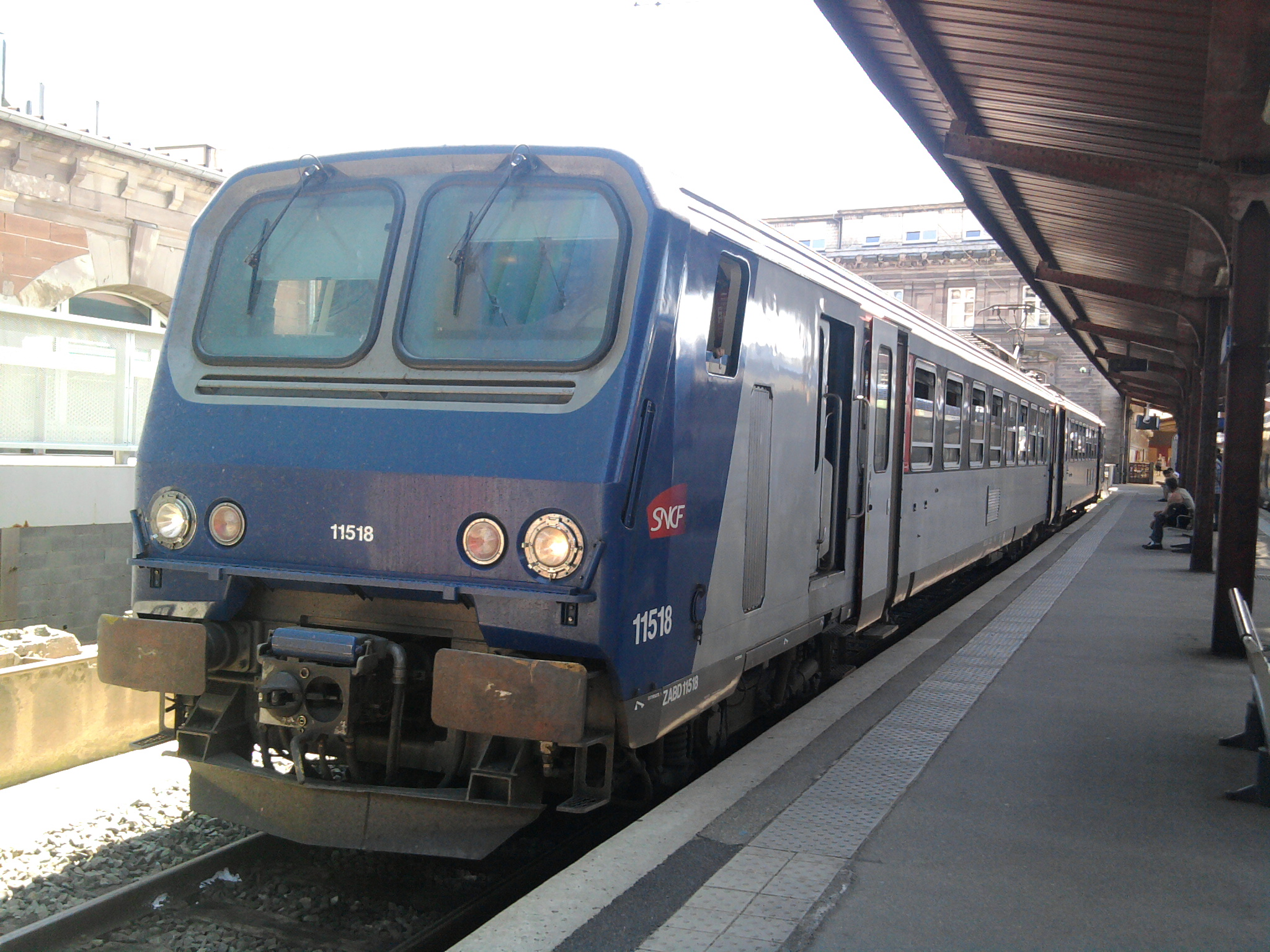 Z11500 du TER Alsace en Gare de Strasbourg